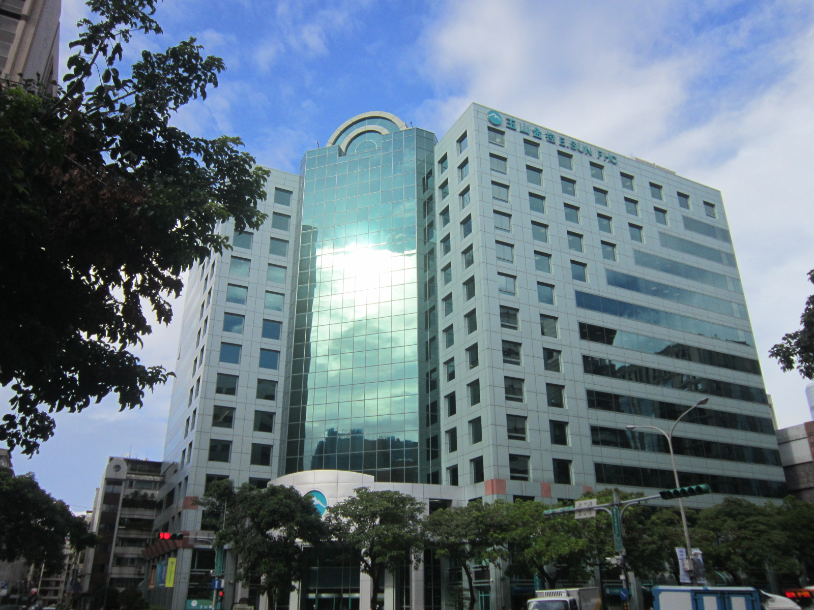 位於台北市民生東路三段上的玉山金控總部大樓